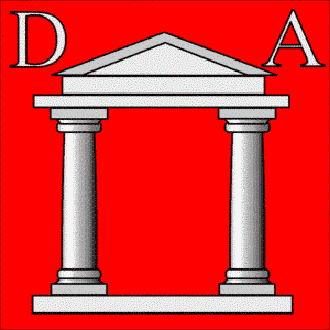 baron officier de la maison impériale